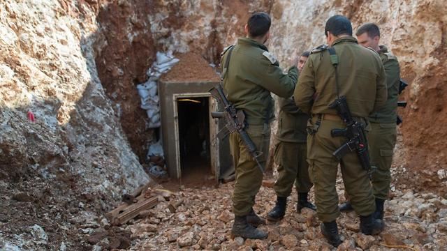 סיור במנהרת הדגל של חיזבאללה. נטרולה של מנהרת הדגל "רמיה", השישית והאחרונה. המנהרה שמגיעה לעומק 80 מטרים, שזהה לכ-22 קומות, ופתחה נמצא כ-77 מטרים לתוך גבול ישראל. בפתח המנהרה.